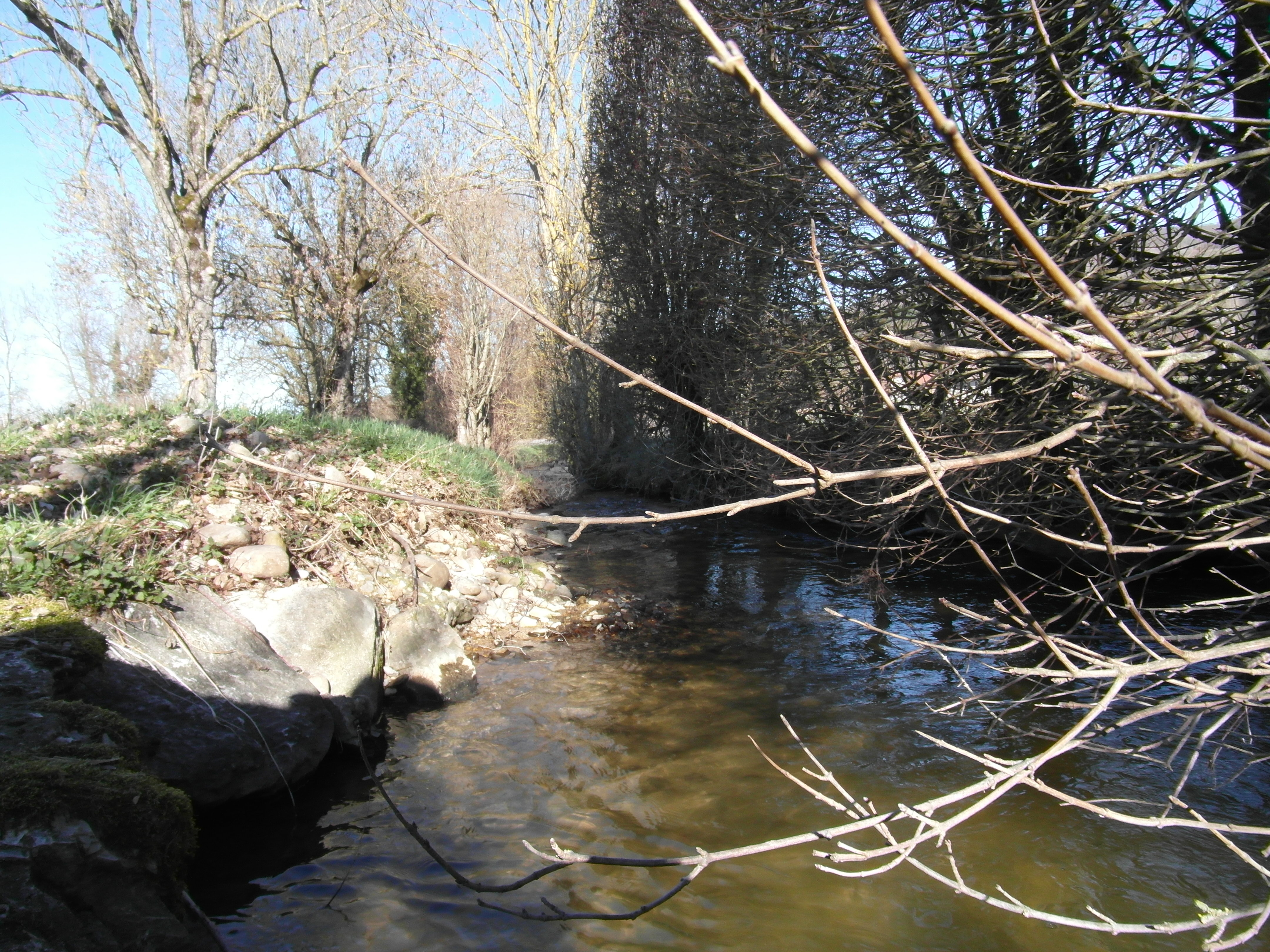 La Bourbre à Châbons en mars 2019